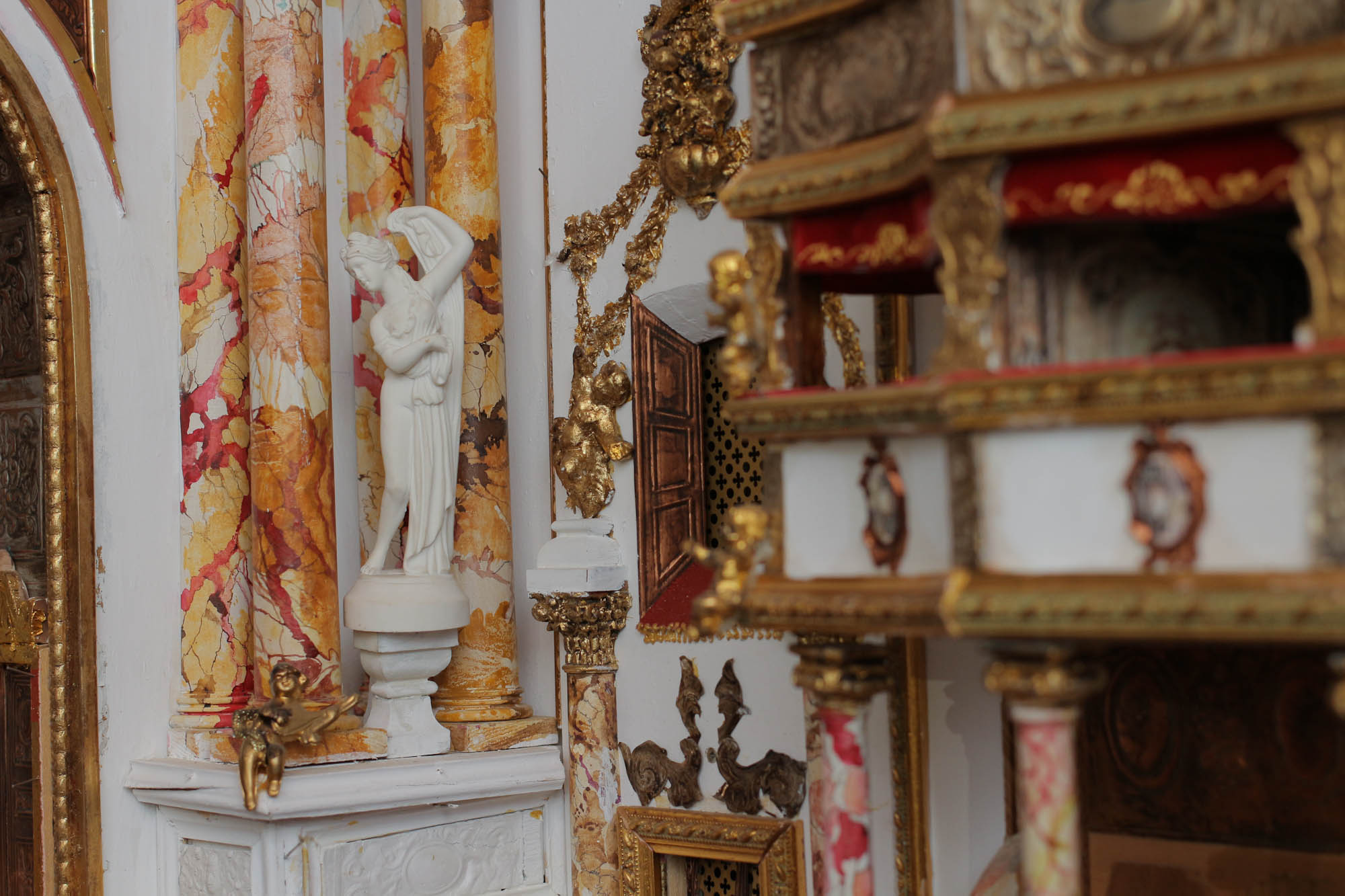 MODELLINO-TEATRO-PERGOLA-dettaglio-statua.jpg